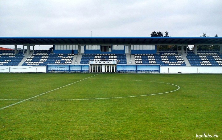 стадион